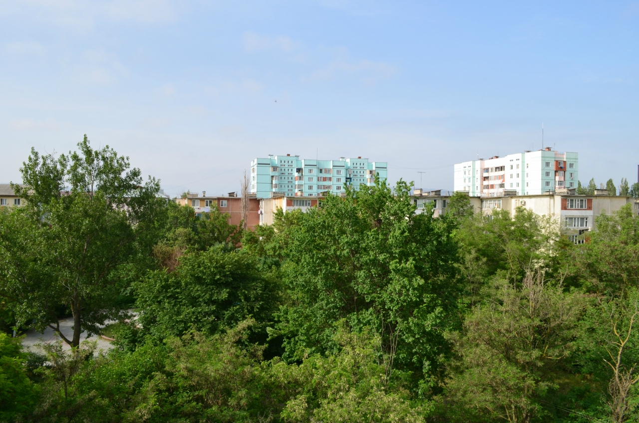 Микрорайон города Кизилюрт